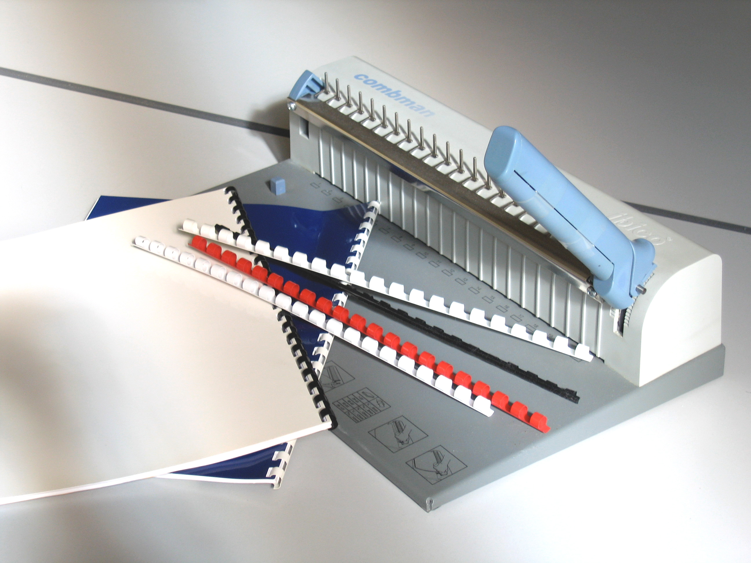 Perforatrice manuelle pour reliure bureautique, anneaux plastiques et exemple de document relié source personnelle : photo Dominique grassigli